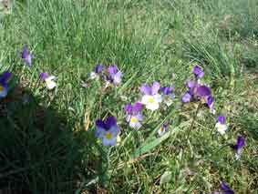 Blumen (Viola sp.) auf Buhnenwerder